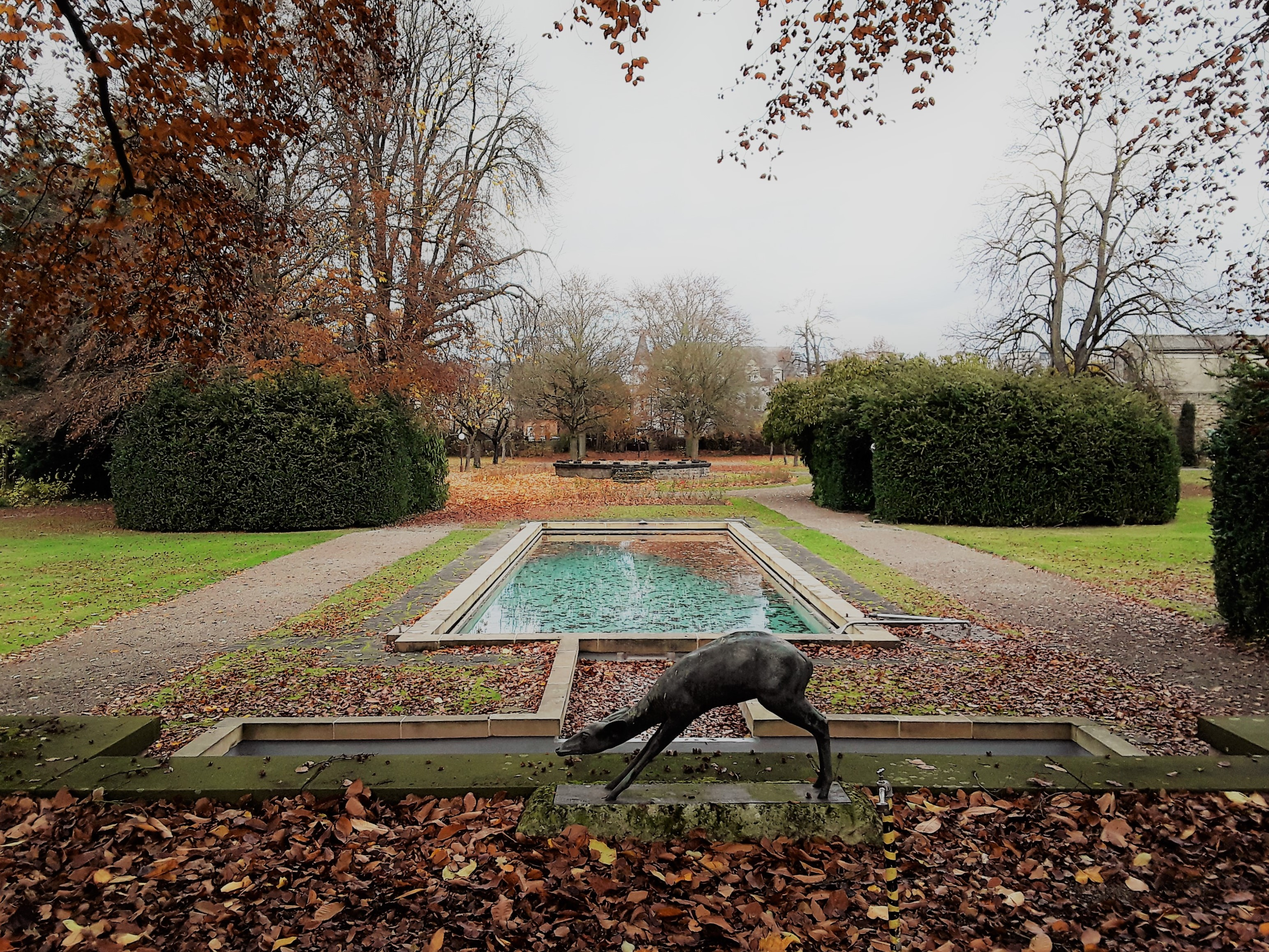 Luxembourg, Parc Heintz au quartier de la Gare.